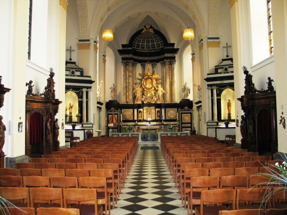 interieur Virga-Jesse - eigen foto